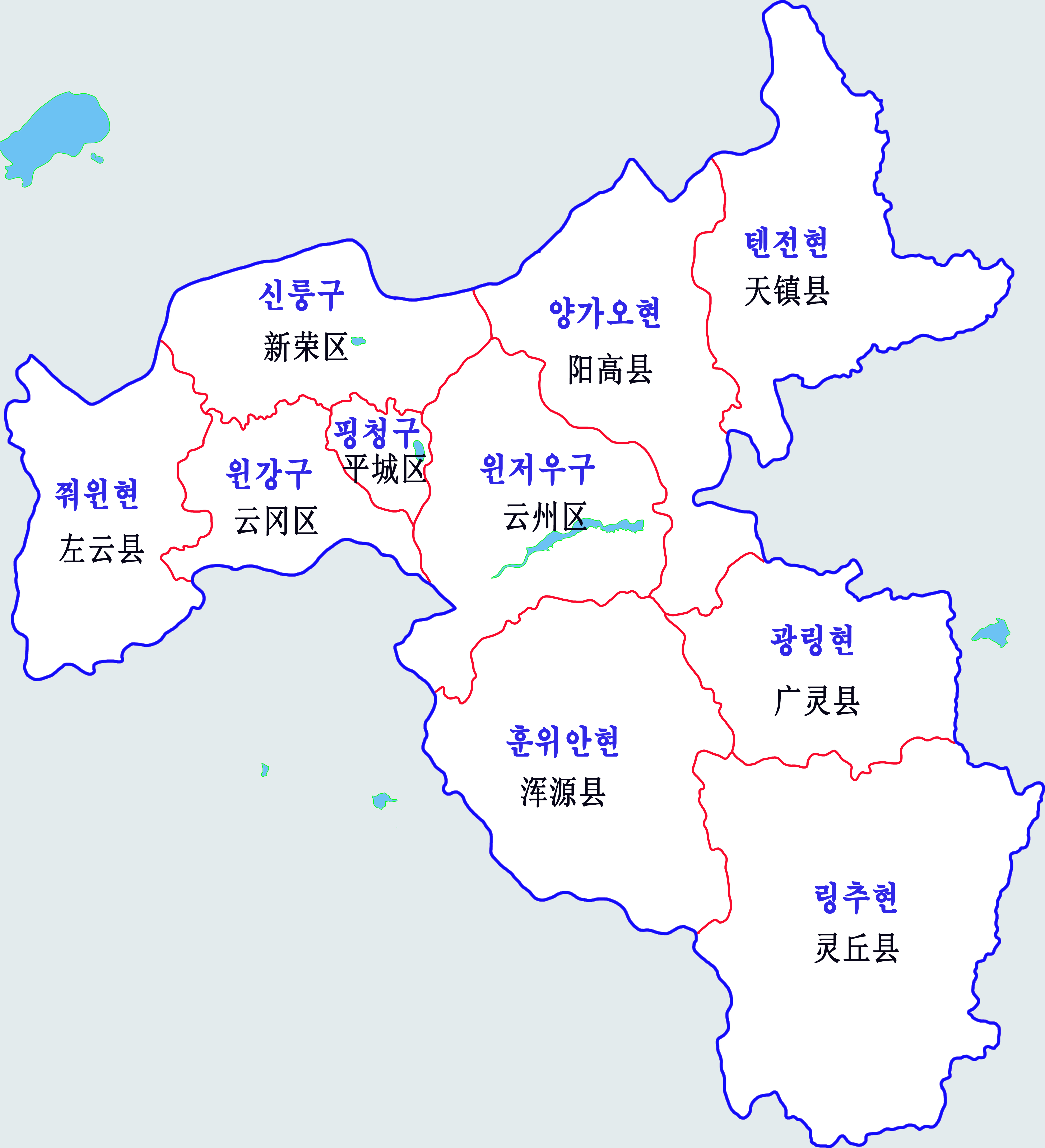 다통시 행정지도